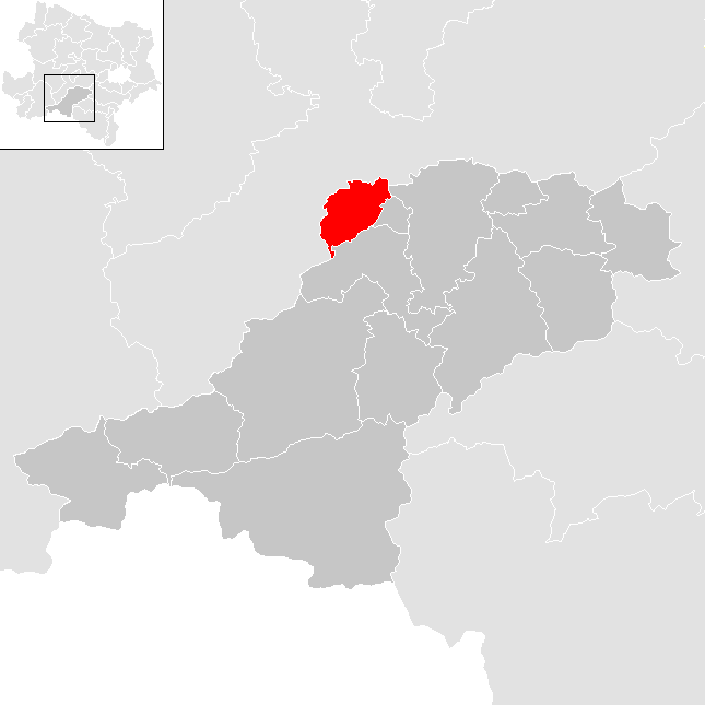 Bezirk Lilienfeld